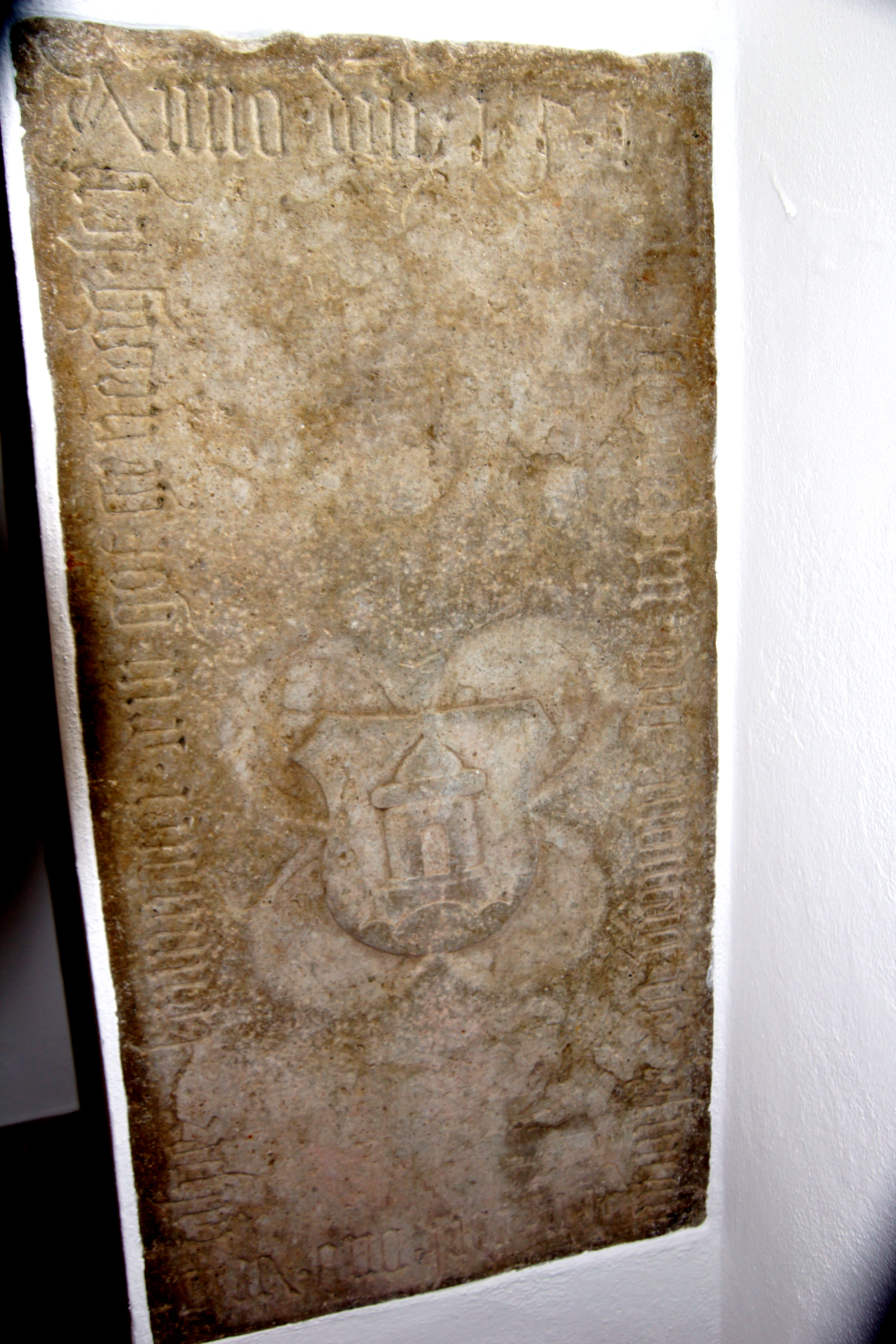 Die katholische Pfarrkirche Mariä Himmelfahrt in Hohenkemnath bei Amberg